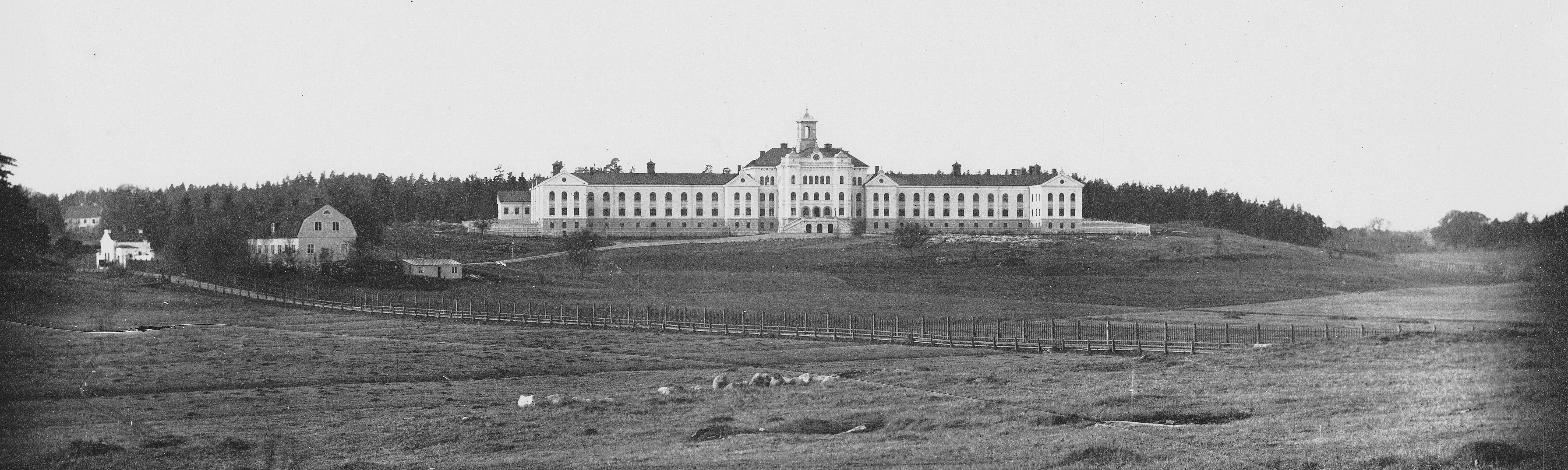 Konradsberg